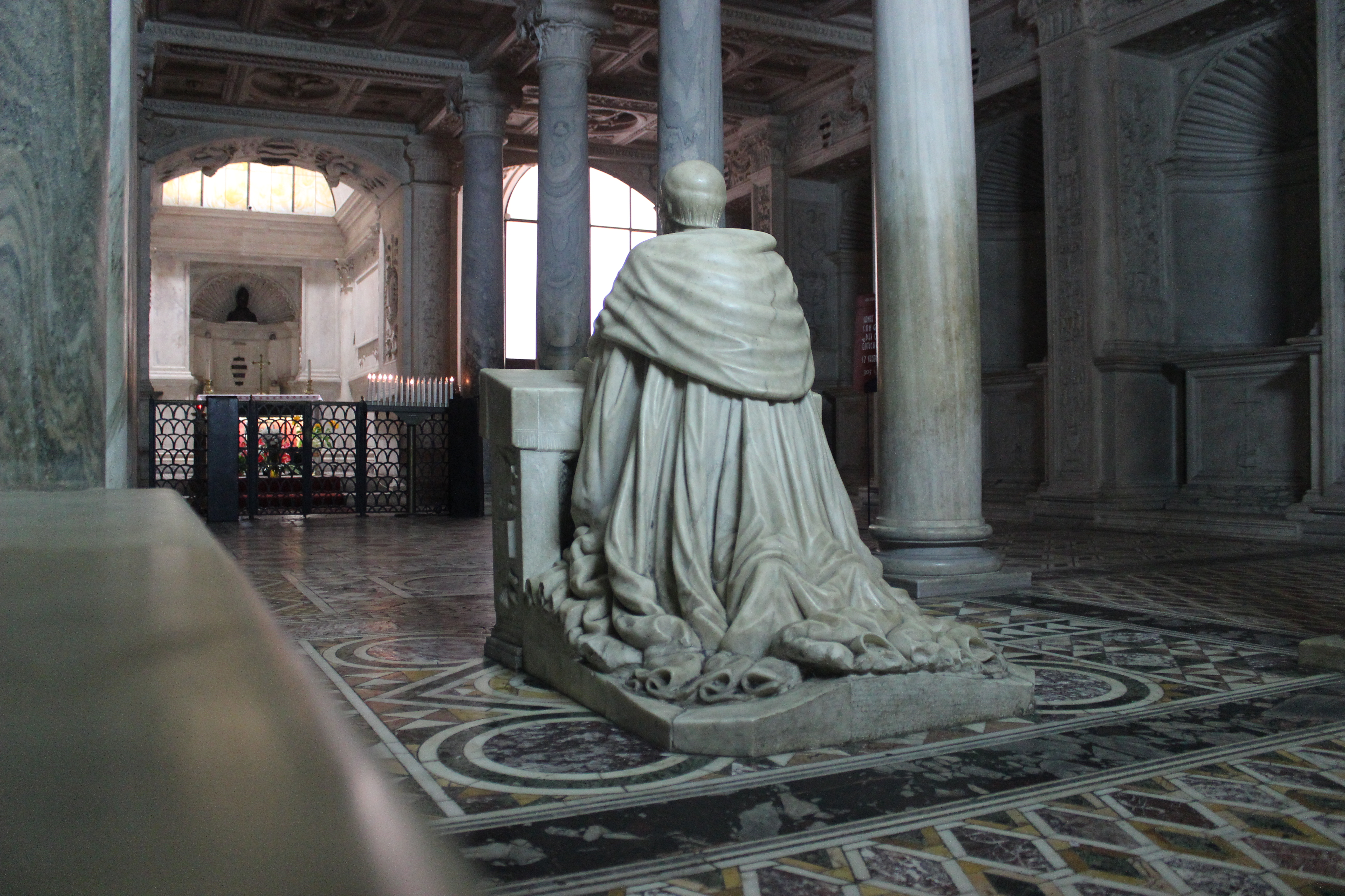 Catedral de Nápoles, cripta bajo el presbiterio.